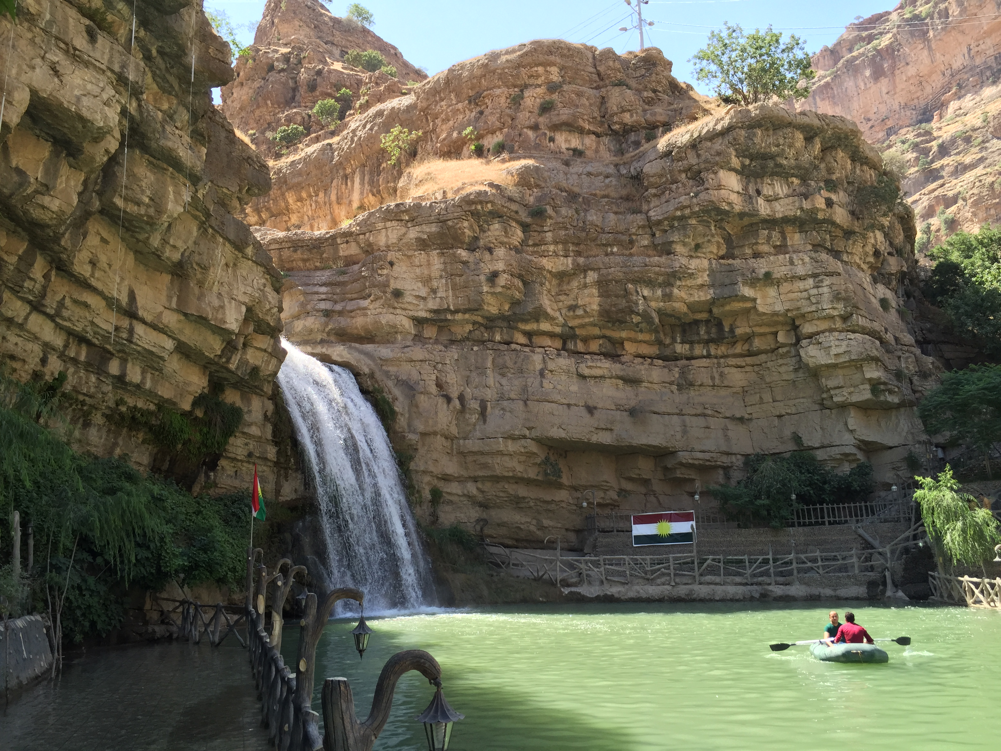 الشجرة التين والأغنام